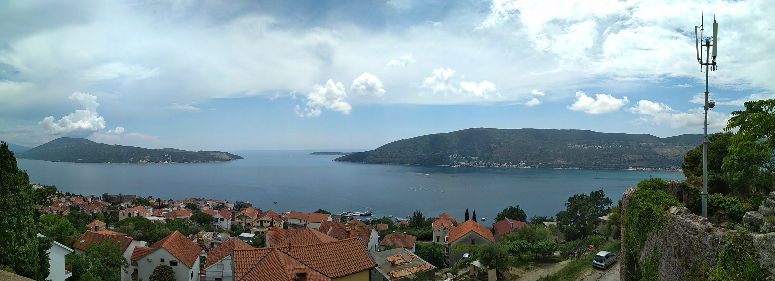 Панорама Херцег-Нови и Которского залива с башни крепости Шпаньола.